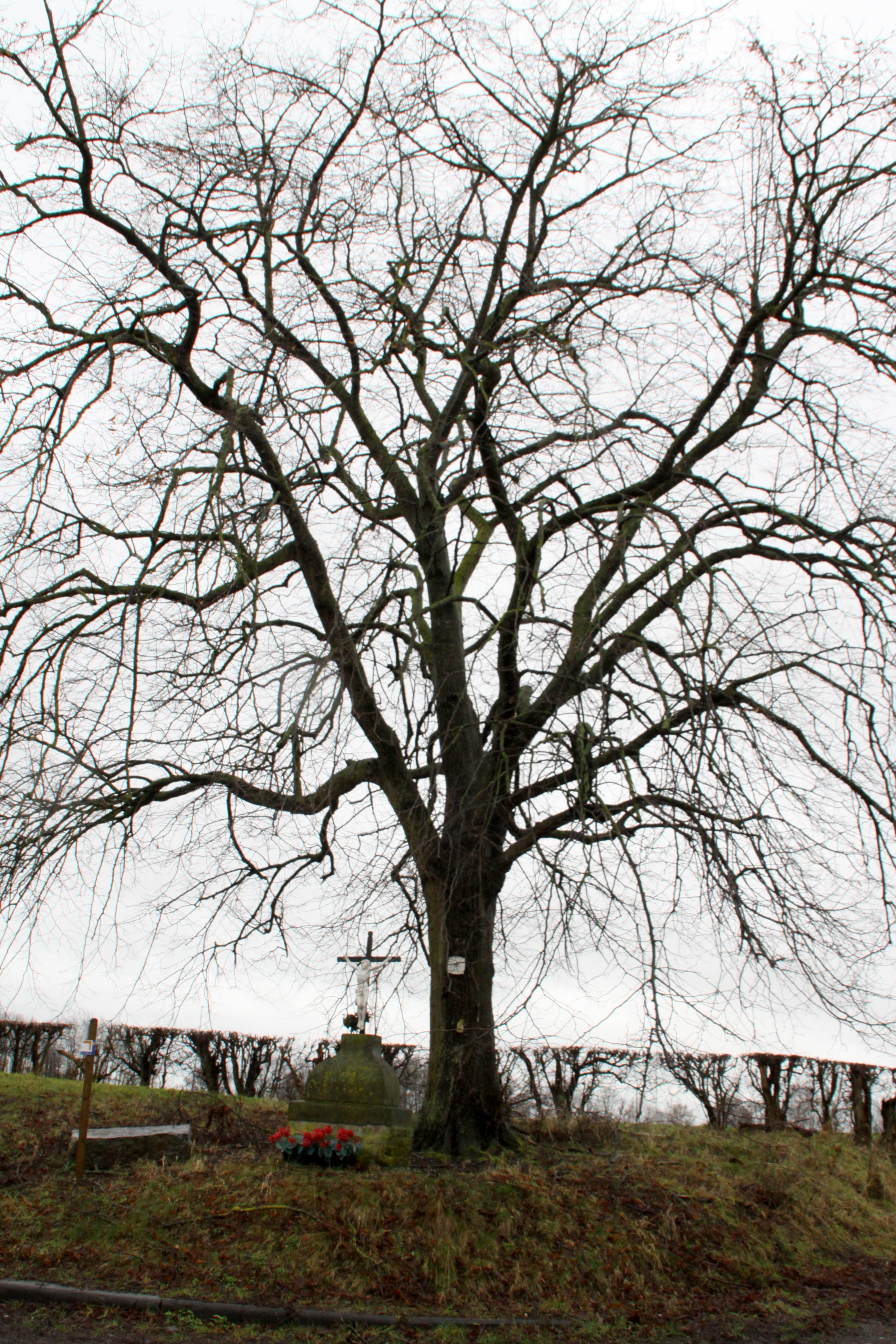 Lann um Coftice